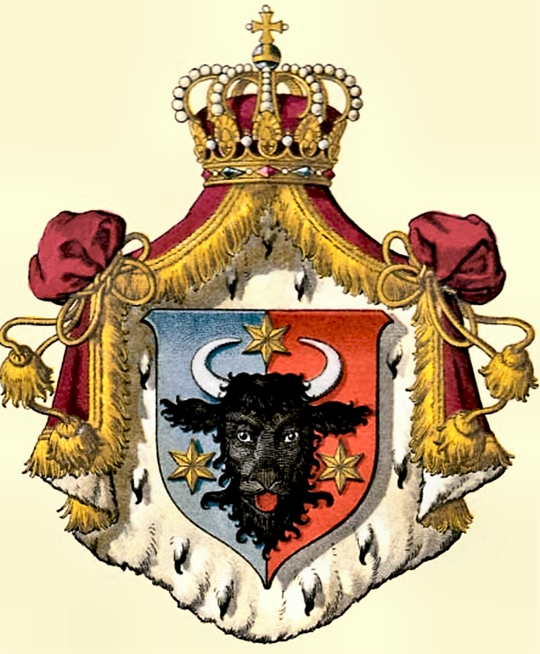 Wappendes des Kronlandes Herzogtum Bukowina 1849 bis 1918